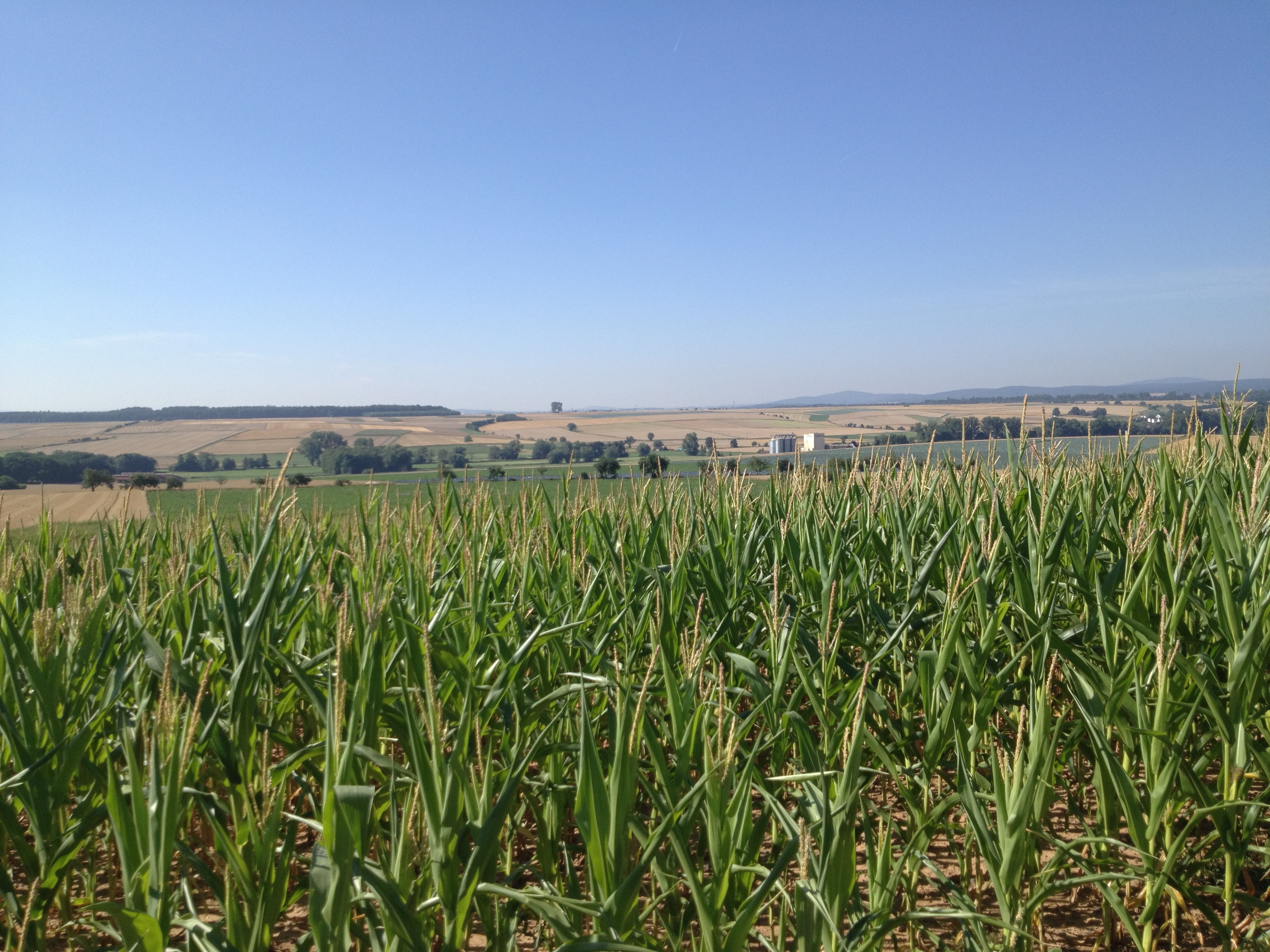 Blick Richtung Süden vom Gudensberger Nacken; links das Oberste Holz